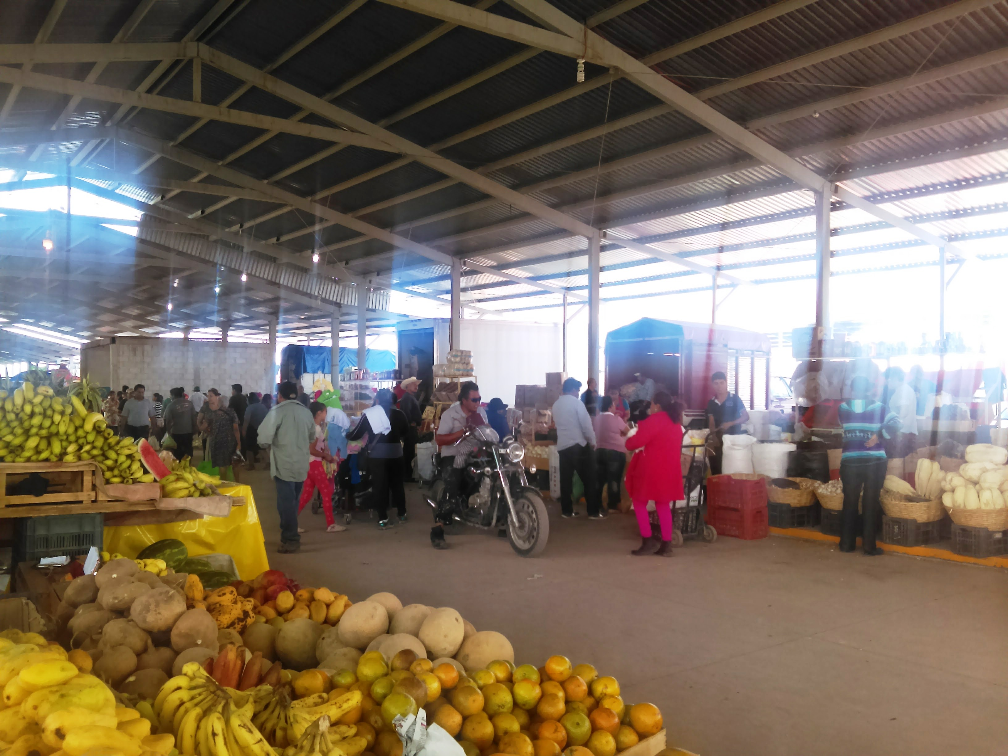 Central de Abastos en Actopan, Hidalgo, México